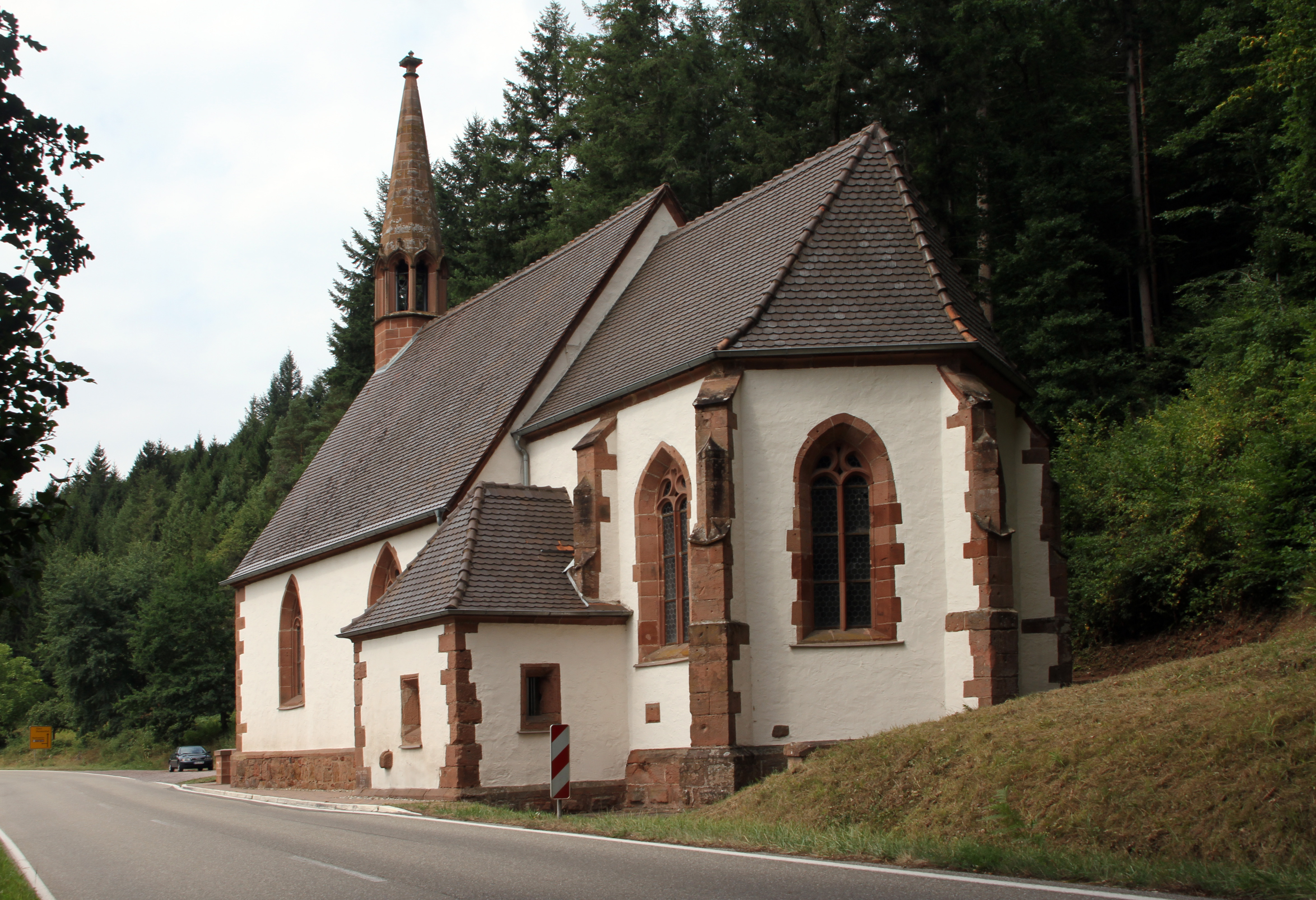 Niederschlettenbach, St. Anna-Kapelle; westlich des Ortes an der L 478; spätgotischer Saalbau, Chor mit angebauter Sakristei, zweite Hälfte des 15. Jahrhunderts.